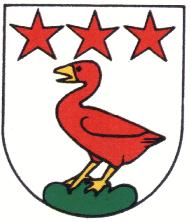 wappen von Courgenay Kanton Jura Schweiz